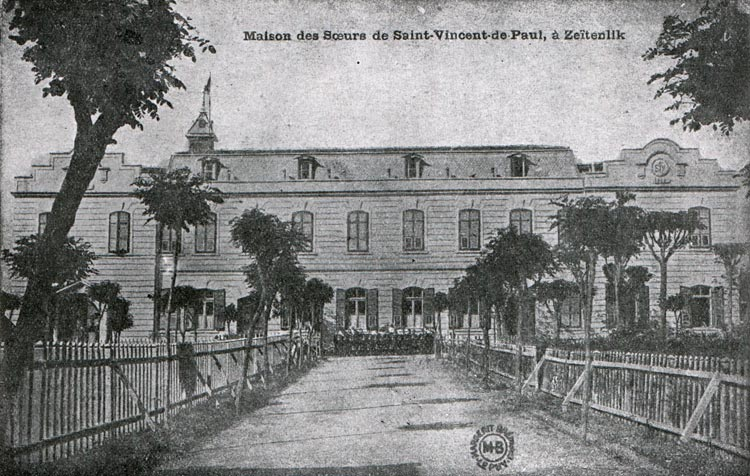 Maison des Soeurs de Saint-Vincent de Paul à Zeitenlik